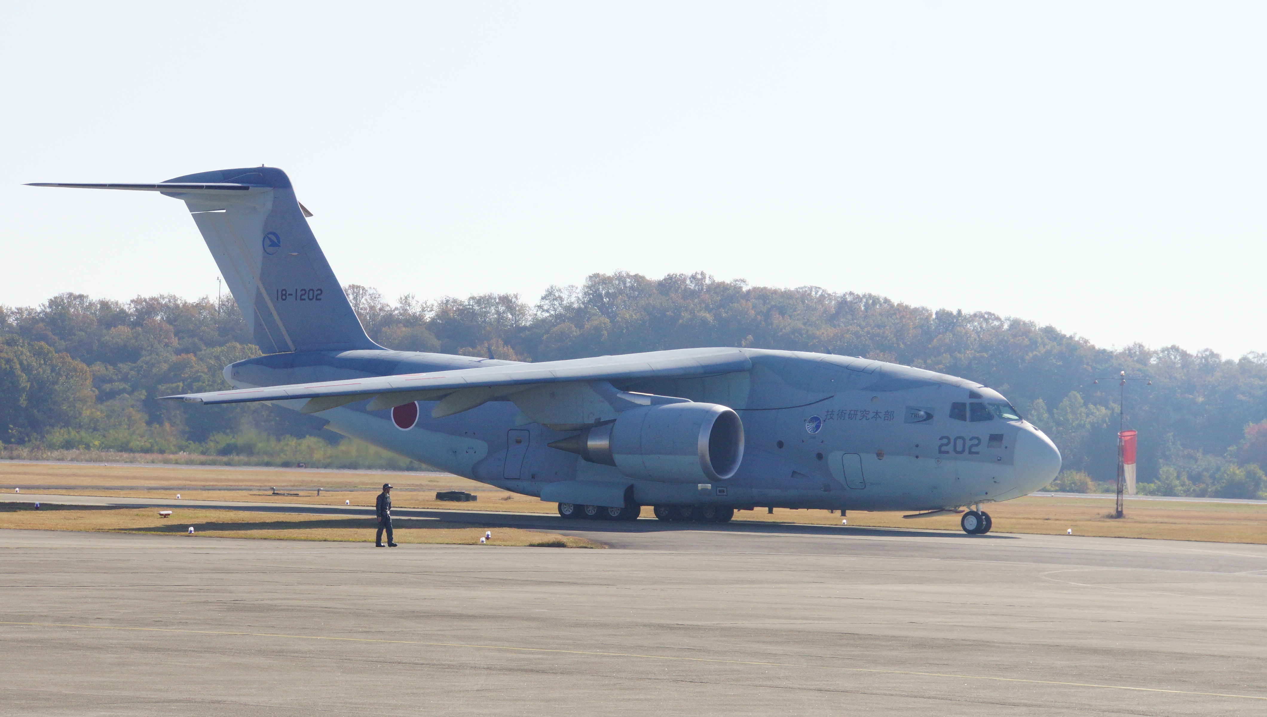 航空自衛隊 XC-2輸送機（18-1202号機） タキシング中。 14年11月23日 航空自衛隊岐阜基地にて。